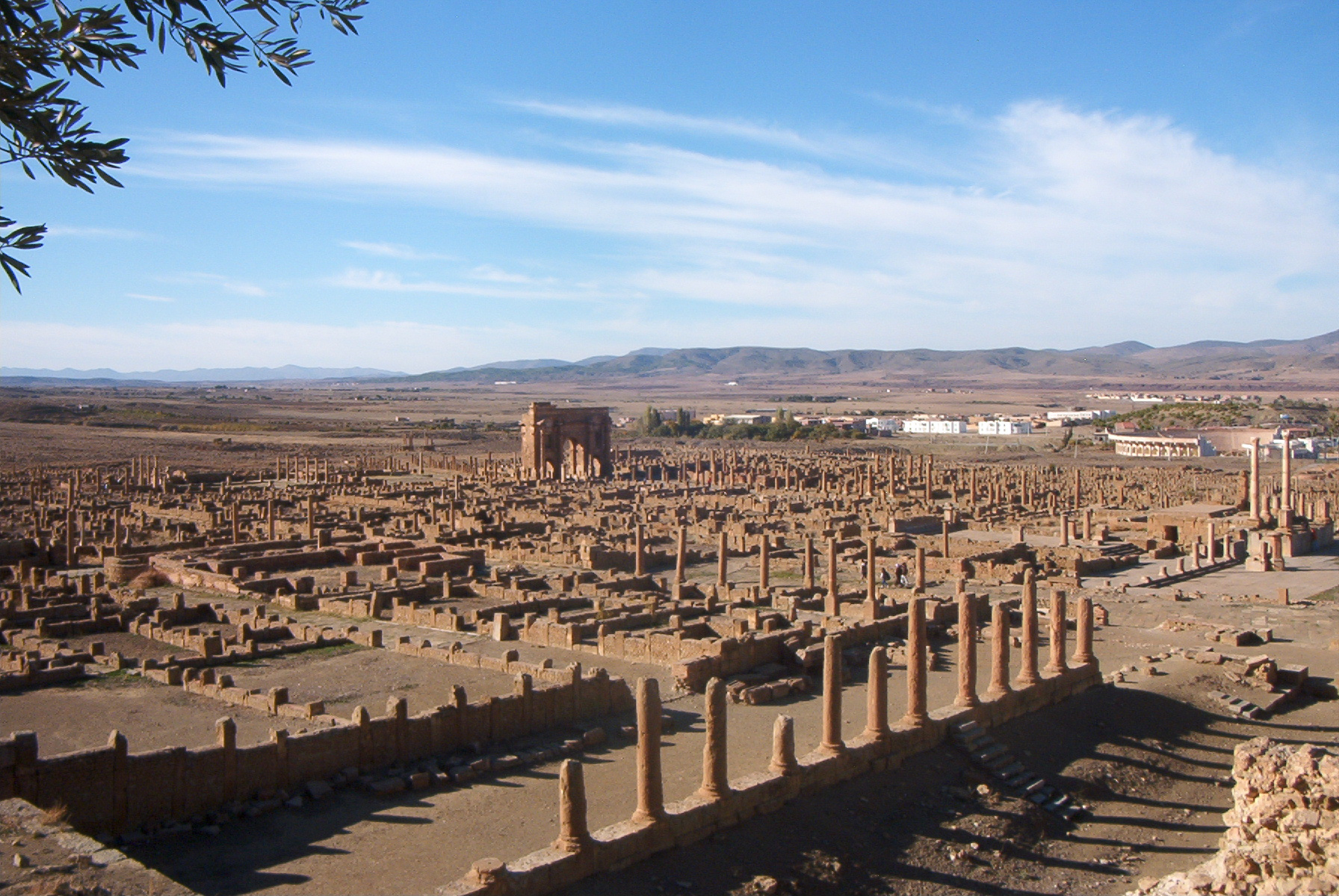 Vue d'ensemble des ruines de Timgad